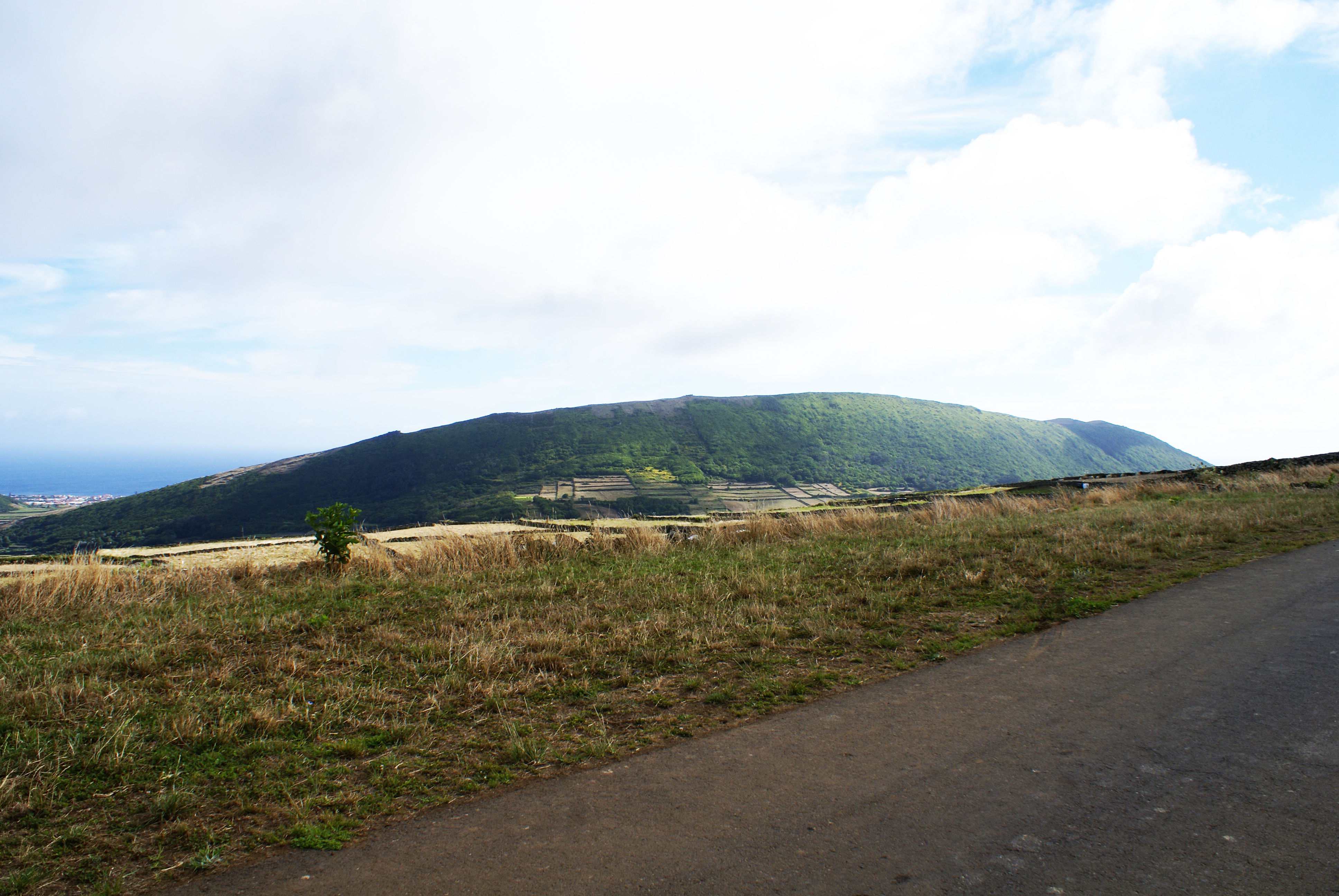 Serra Dormida, vistas, Santa Cruz da Graciosa, ilha Graciosa, Açores, Portugal